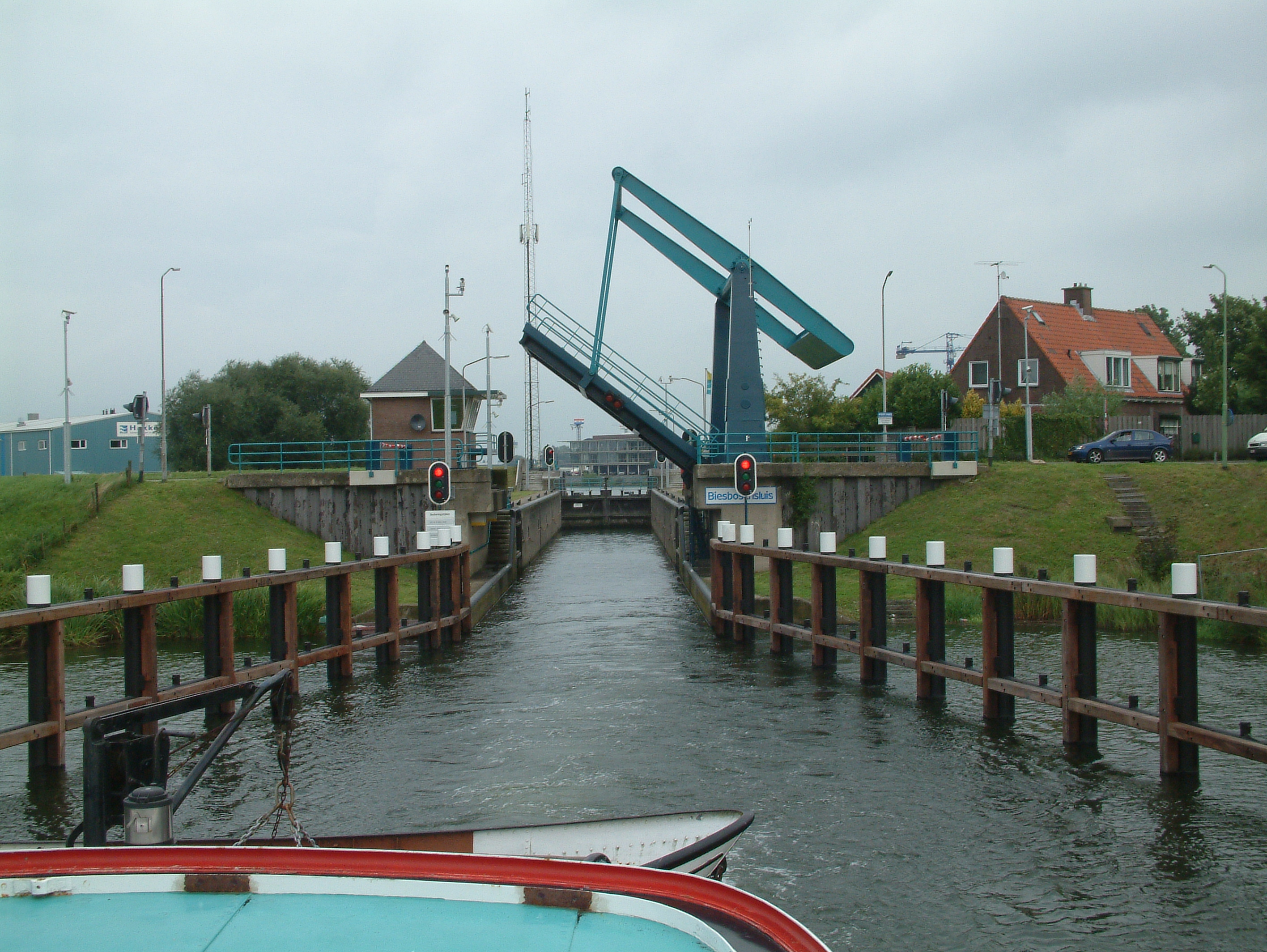 Biesboschsluis tussen de Nieuwe Merwede en het Steurgat